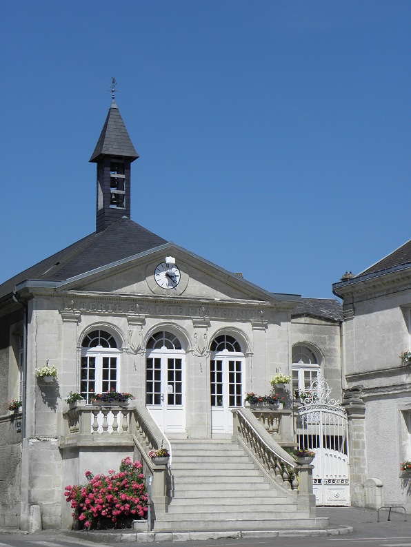 Mairie de Mons-en-Laonnois (02).